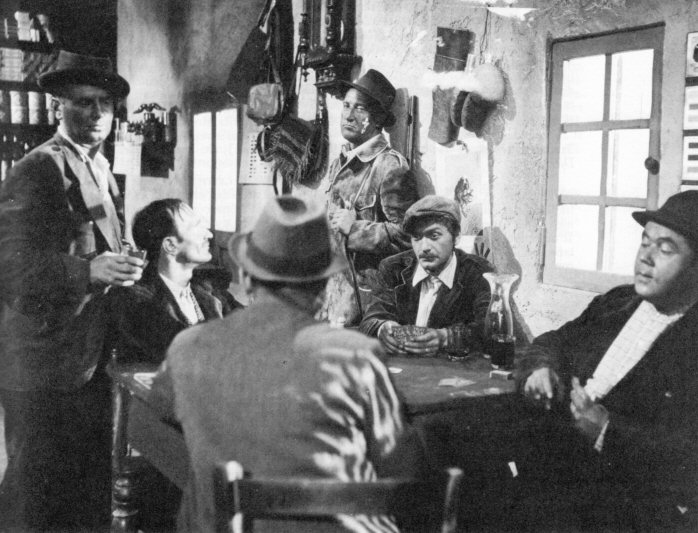 Foto di scena di Tragica notte, regia di Mario Soldati (1942). Fonte: Francesco Savio, Ma l'amore no, Sonzogno, Milano 1975, pag. 359.